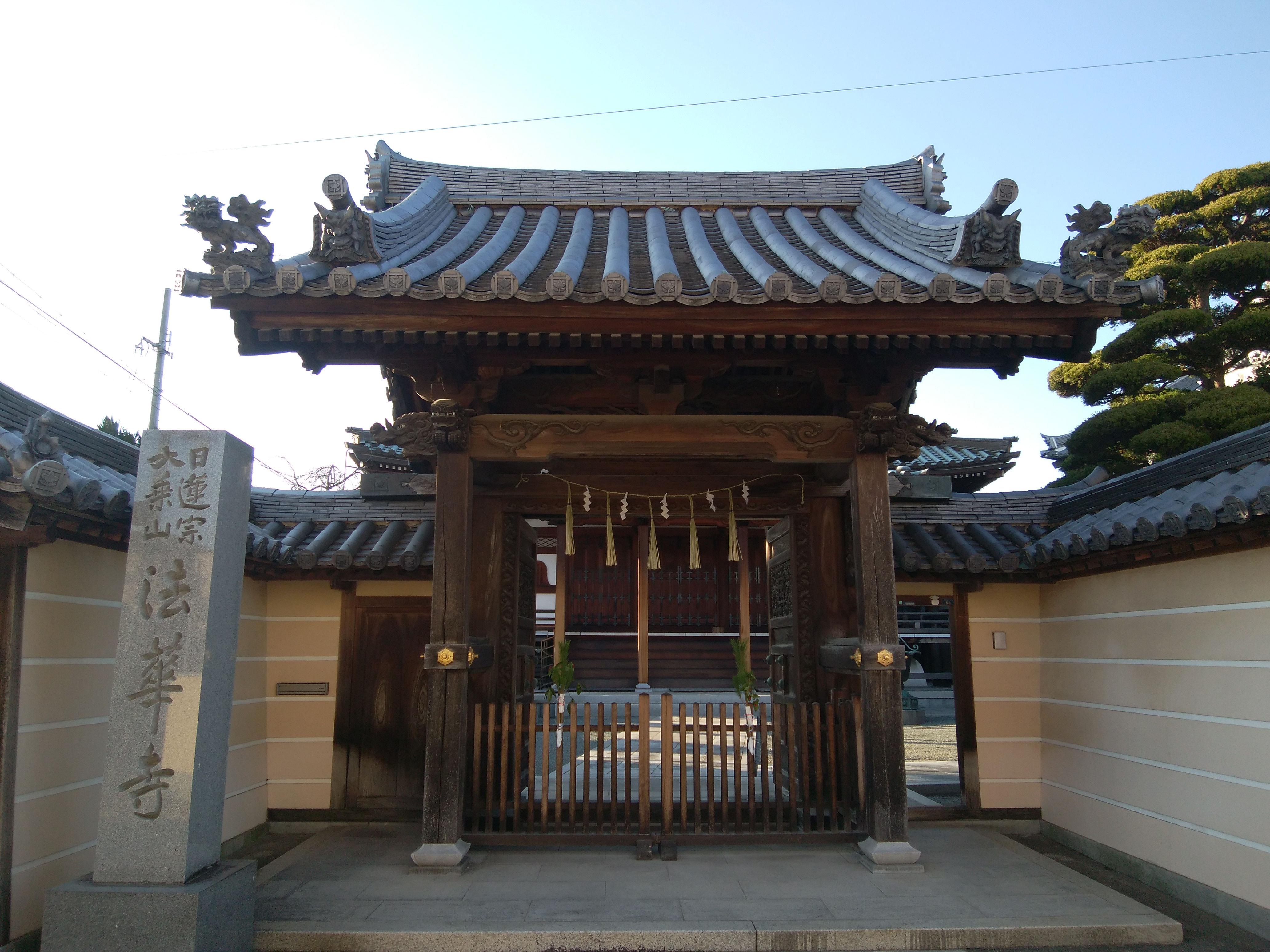 大乗山法華寺（ほっけじ）。通称六条門流播磨本山